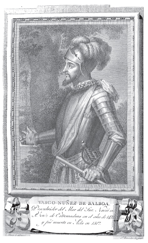 Retrato de Vasco Núñez de Balboa.